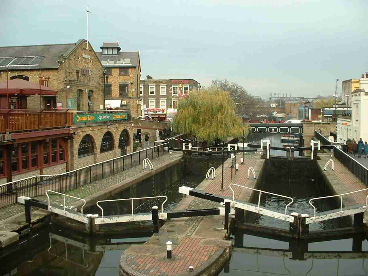 Camden Lock, Regent's Canal, Camden, London.